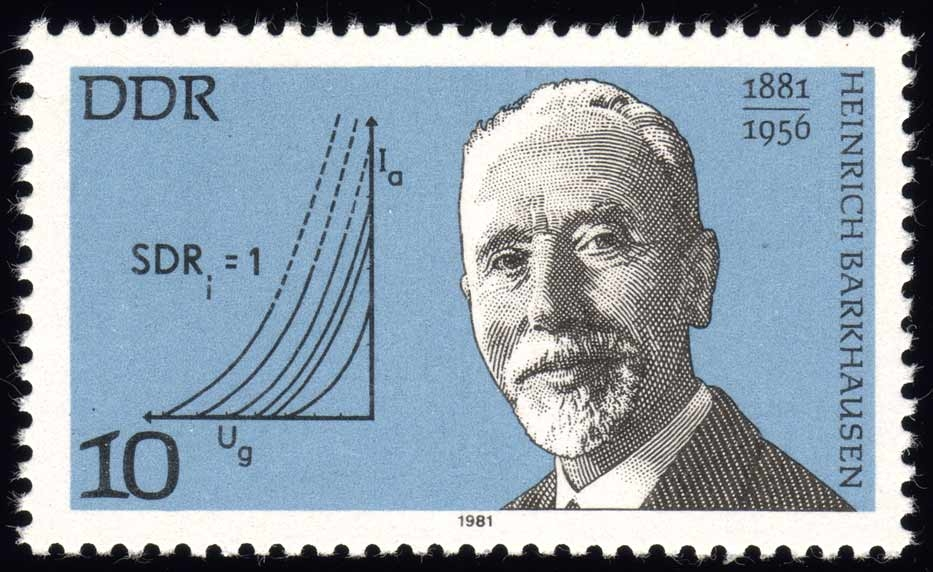 Heinrich Barkhausen (1881–1956), physicien allemand